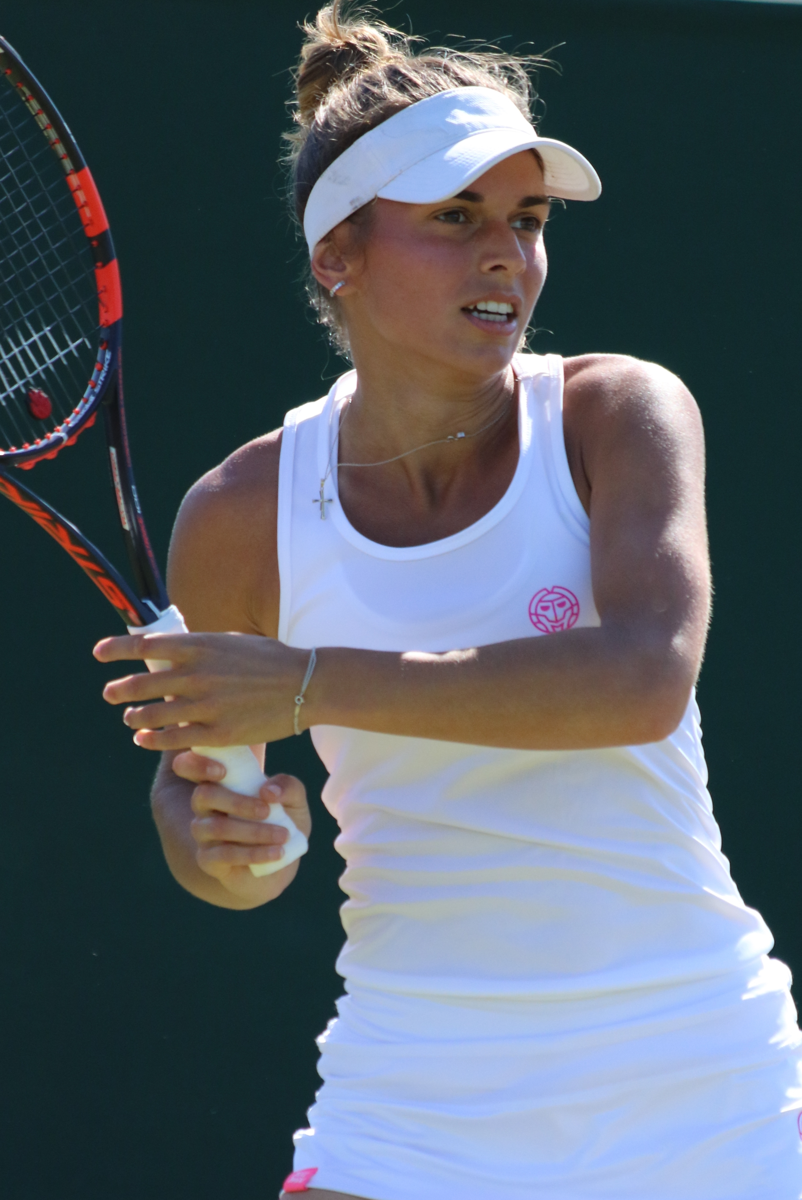 Grammatikopoulou WMQ18 (3)